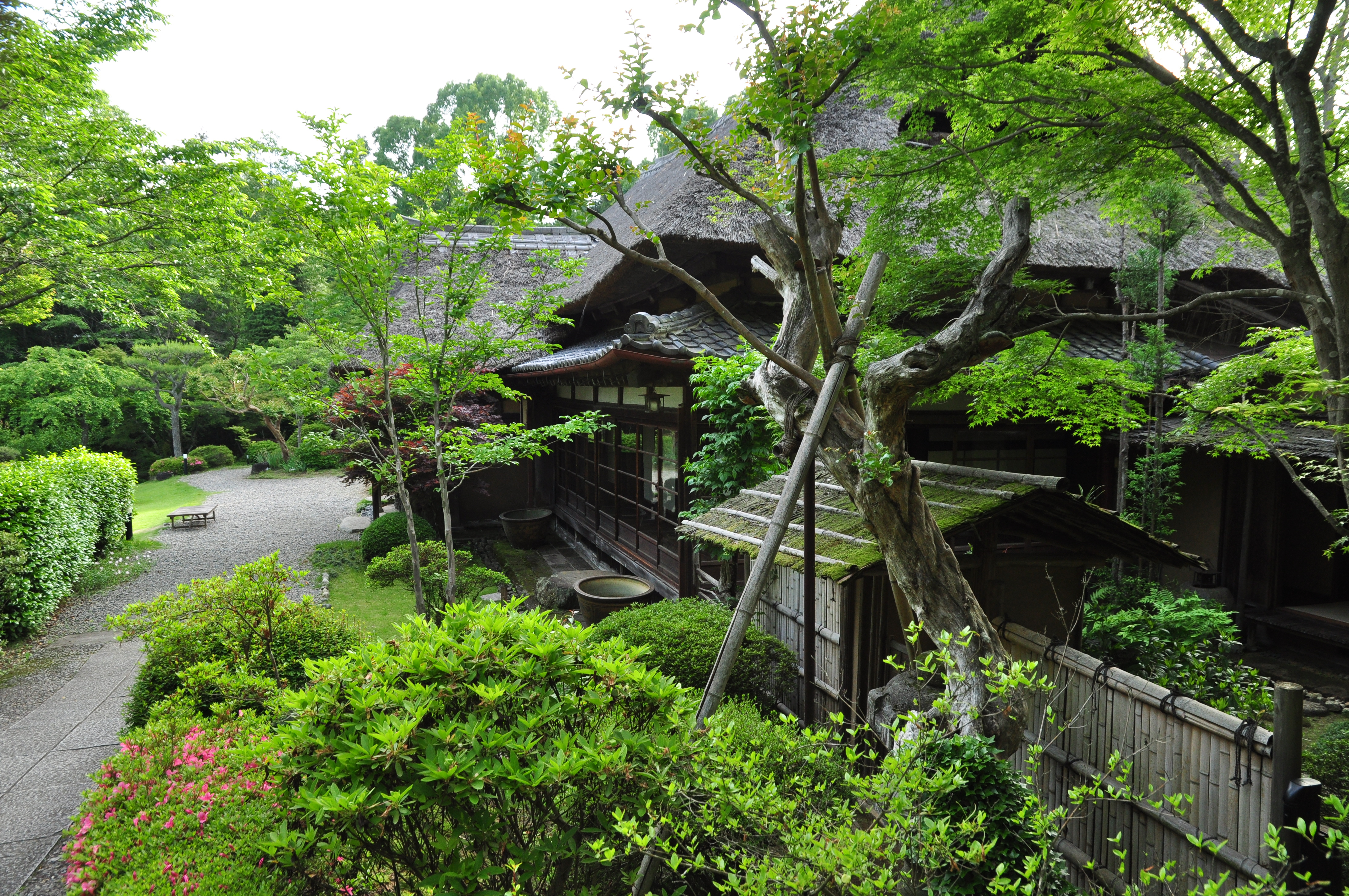 2011.6.4@茨城県笠間市